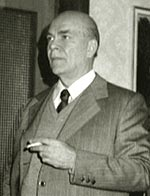 Giuseppe Schirinà durante la consegna del premio Capodieci a Siracusa